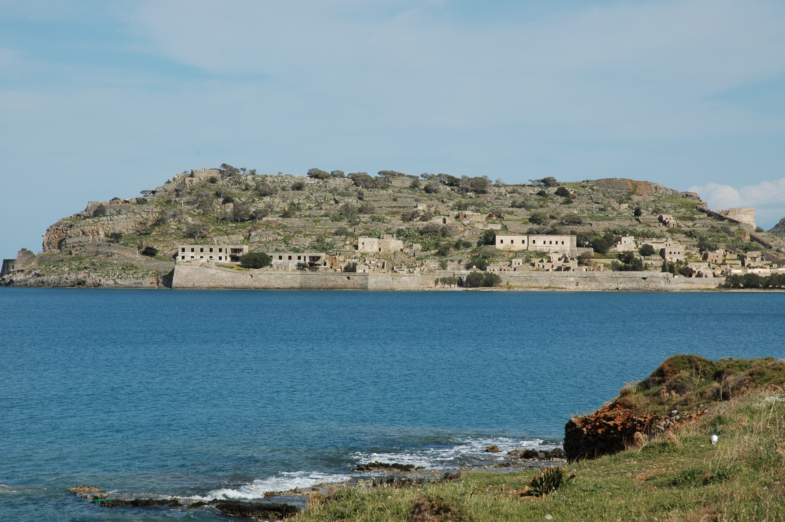 Η Σπιναλόγκα όπως φαίνεται από το χωριό Πλάκα